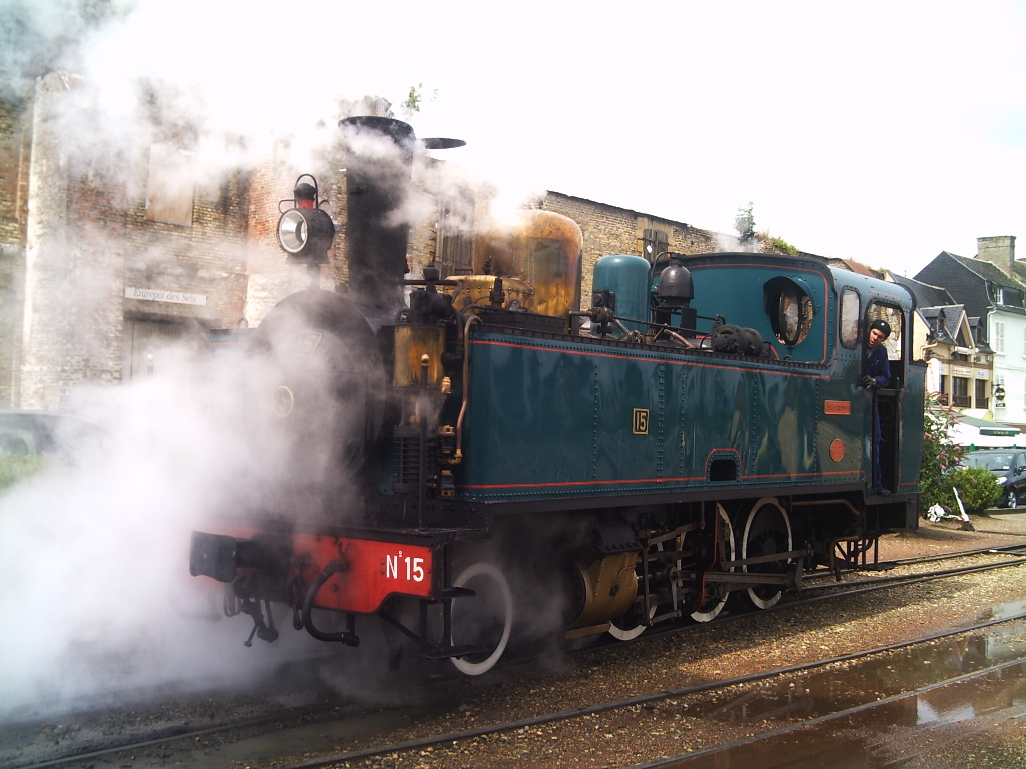 Locomotive in Saint-Valery-sur-Somme - Haine-Saint-Pierre 2-6-0T N°15